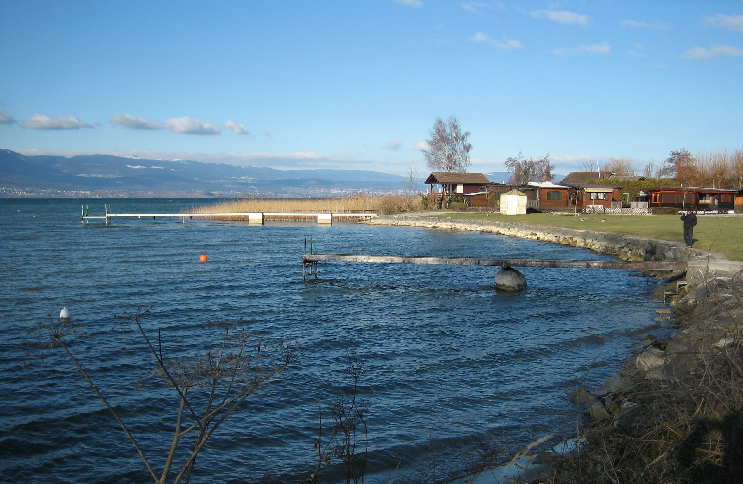 Bord du lac de Neuchâtel près d'Estavayer-le-Lac, canton de Fribourg, Suisse. Author: Fanny Schertzer